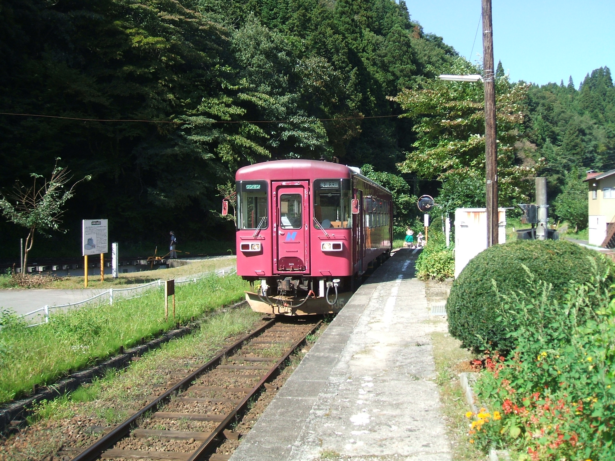 北濃駅に停車中の列車(305)